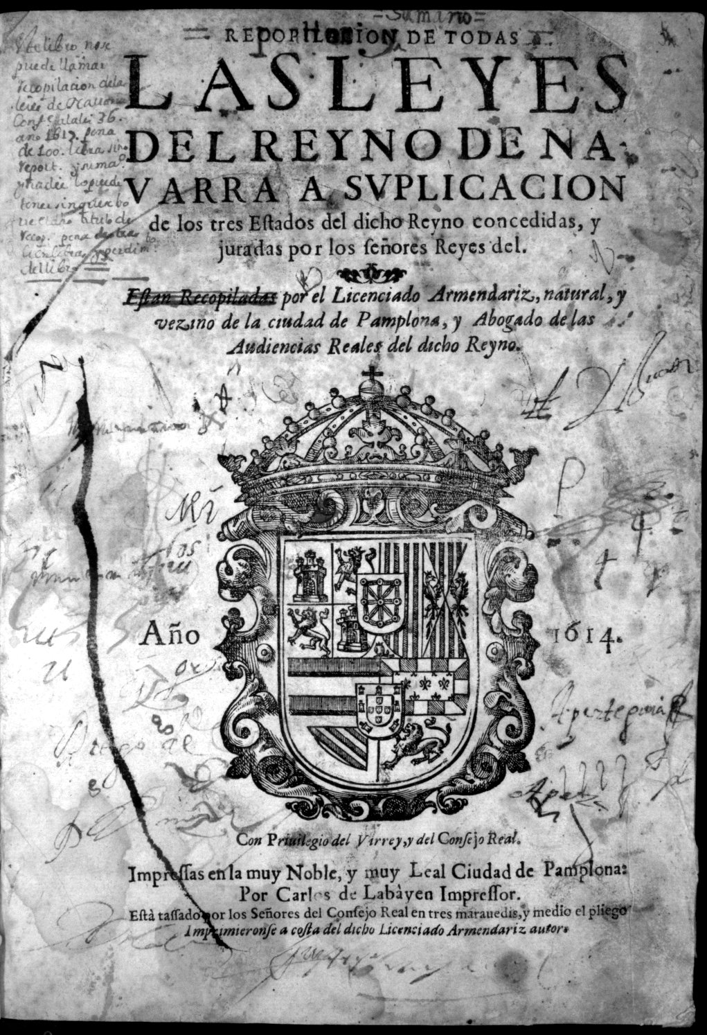 Portada de la edición que recopila las leyes de Navarra en 1614Euskara: Nafarroako legeak biltzen dituen edizioaren aurrealdea (1614)